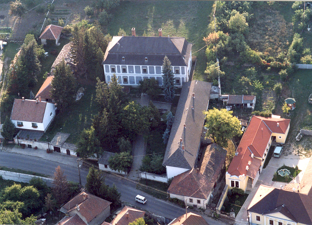 Királyudvar. azonosítója 3283 (törzsszám 1375). 17. század jellegzetes korabarokk stílusában épült Lorántffy Zsuzsanna egykori udvarháza. A manzárdtetős épület főhomlokzatán korabarokk festett homlokzat architektúra található. A műemléket 1960-ban helyreállították és 1972-től a Szőlészeti és Borászati Múzeumnak ad helyet. Az áll. gazdaság vendégháza és bormúzeum, ún. Királyudvar, kora barokk, 17. sz. - Borsod-Abaúj-Zemplén m., Tolcsva, Kossuth Lajos u. 63.